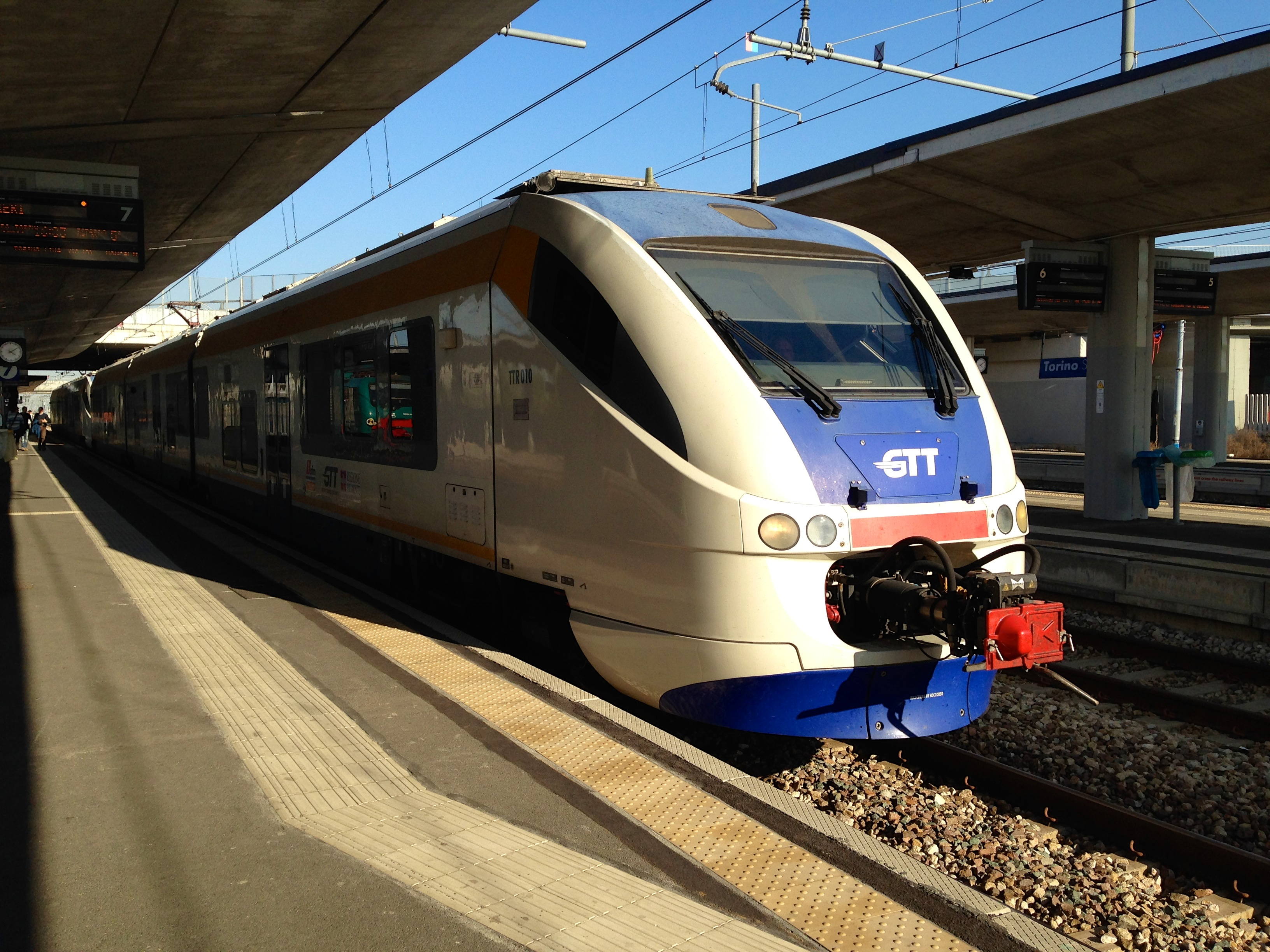 Minuetto GTT presso la stazione di Torino Stura